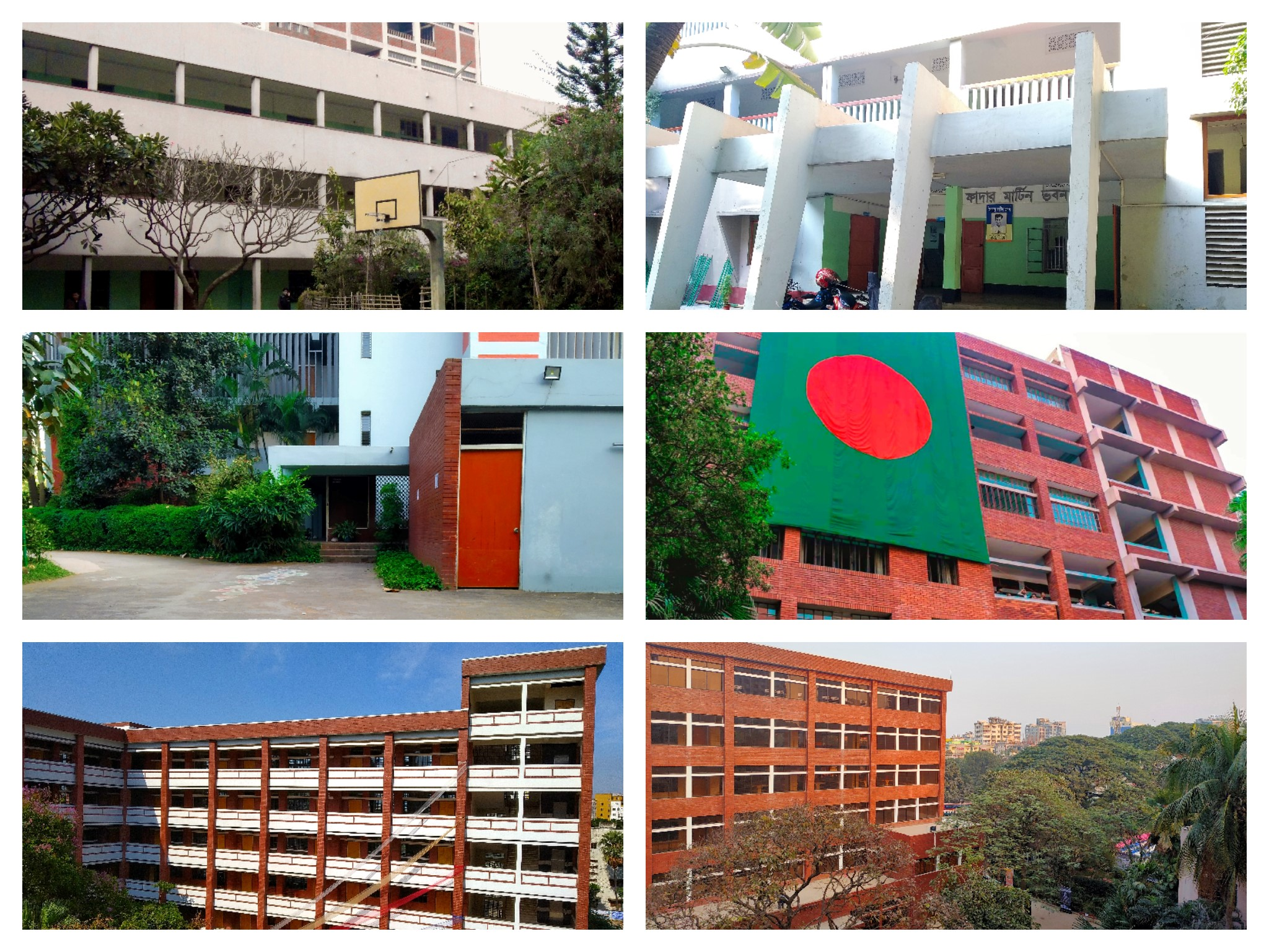 নটর ডেমের ভবনসমূহ